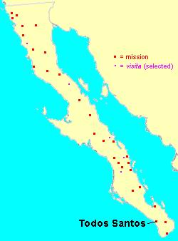 Mapa de la misión de Todos Santos, Baja California Peninsula.